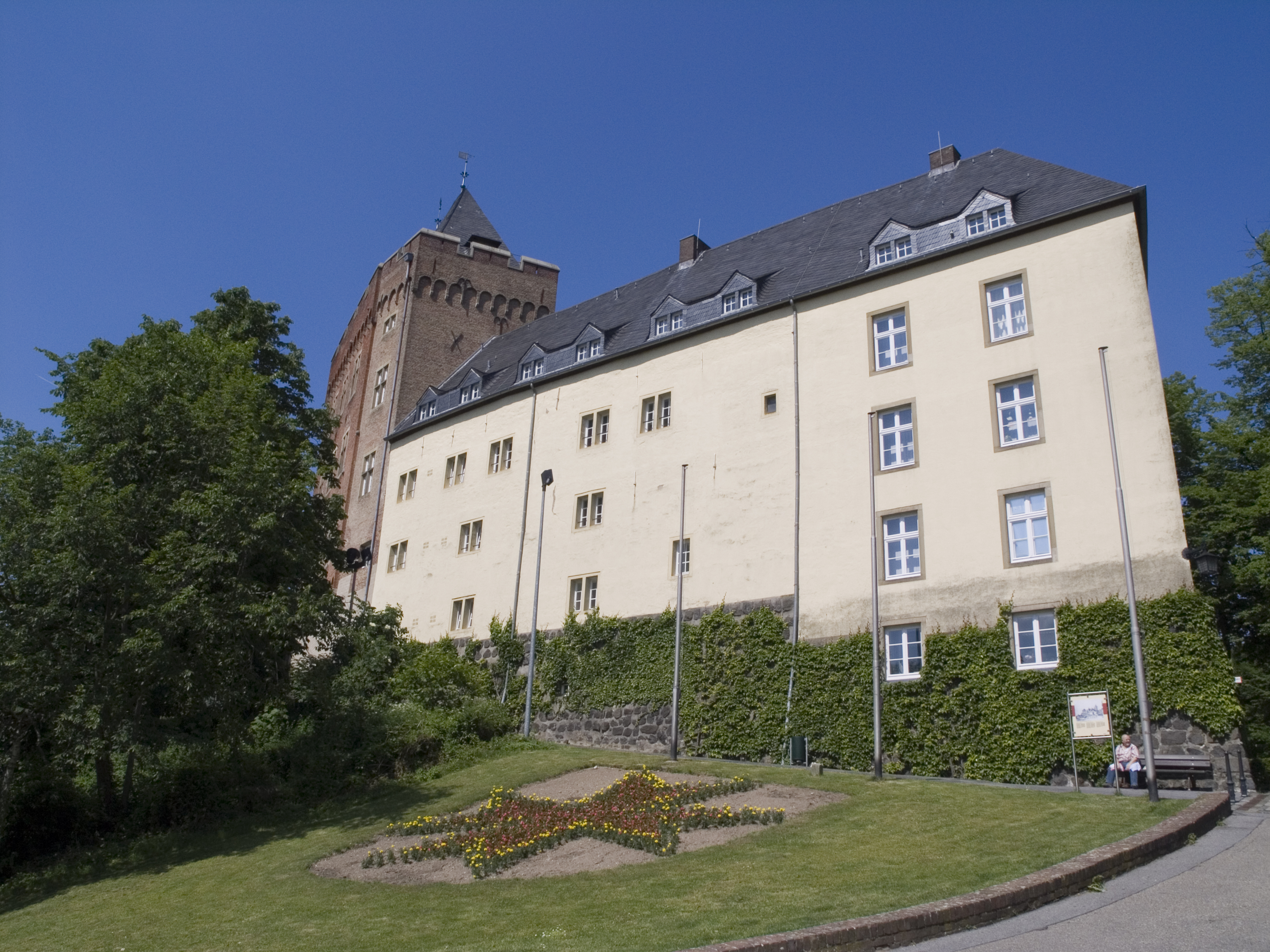 Schwanenburg in Kleve